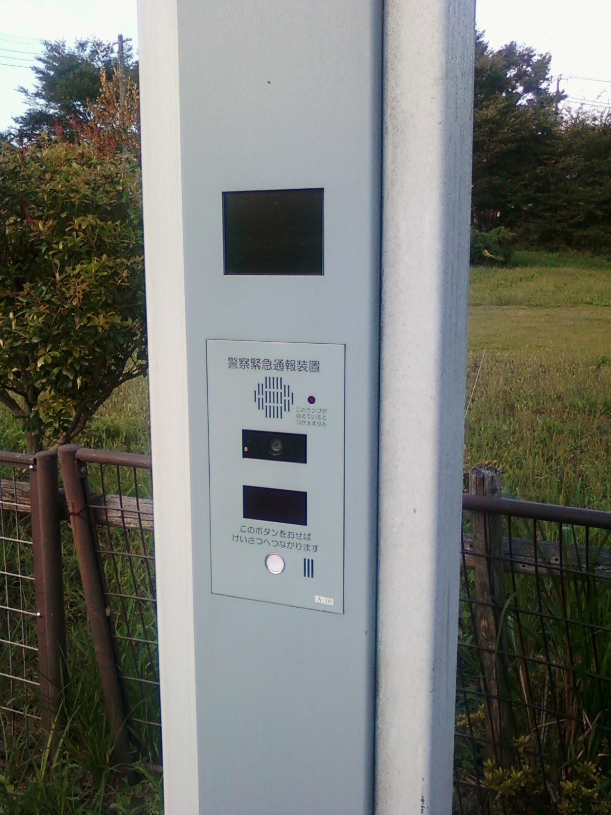 警察緊急通報装置（スーパー防犯灯）